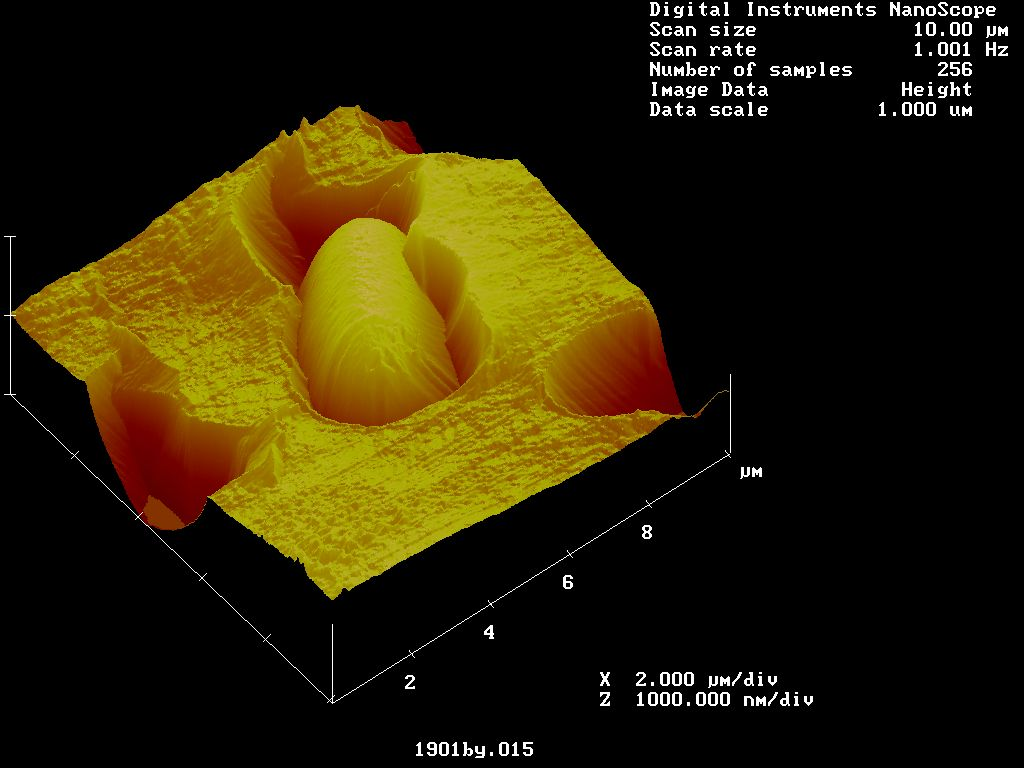 Saccharomycces cerevisae (fixace do isoporové membrány) na AFM